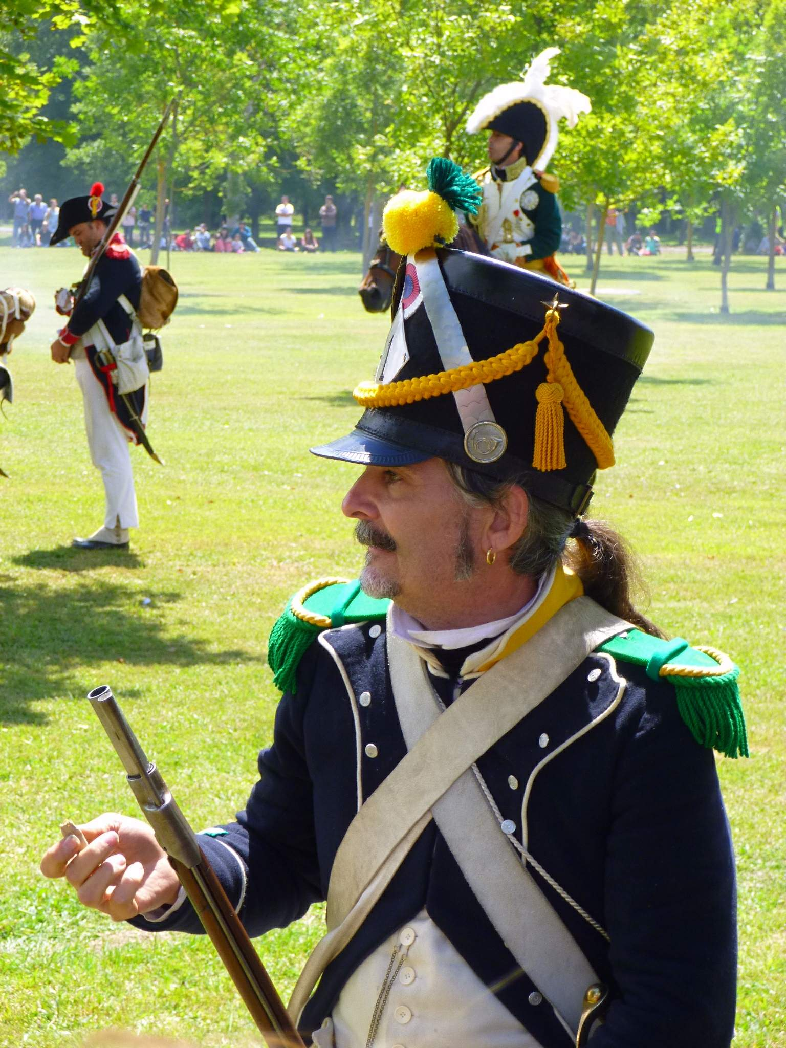 II Recreación histórica de la Batalla de Vitoria (1813), campas de Olárizu, Vitoria-Gasteiz, 29-06-2014